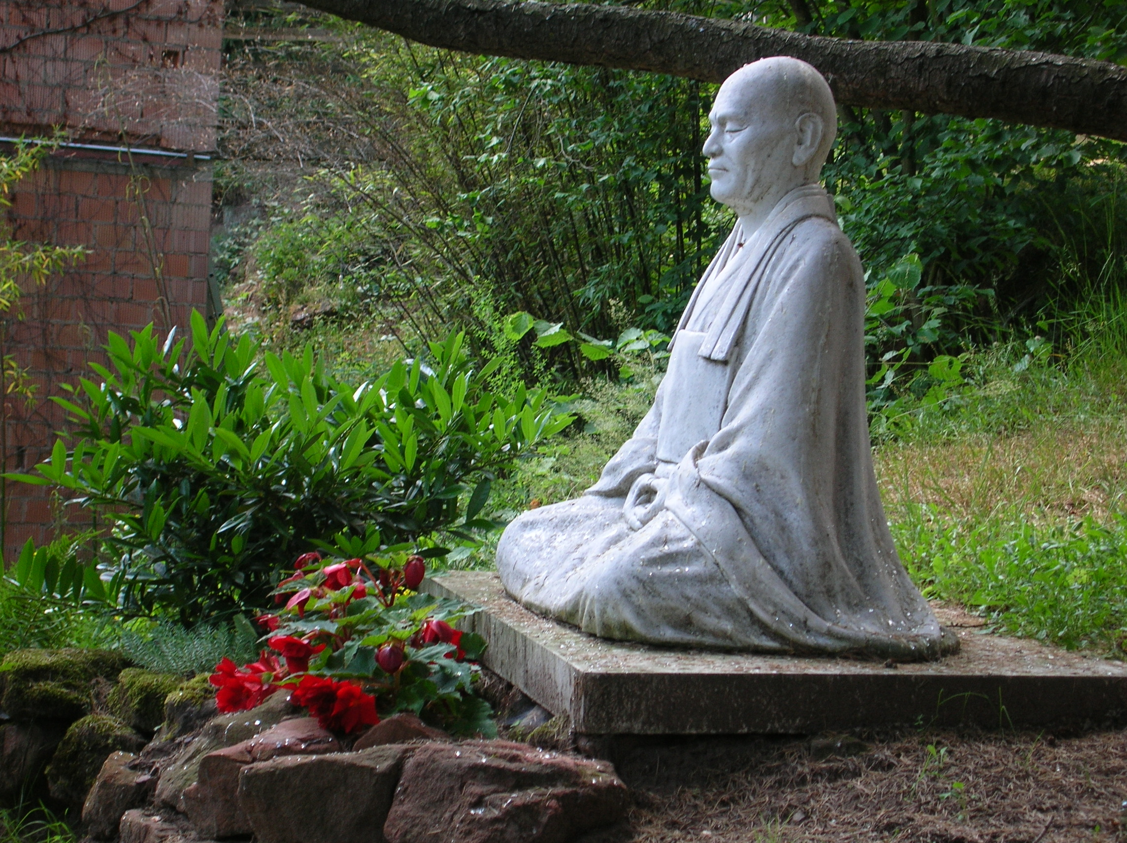 Zen-Meister Taisen Deshimaru